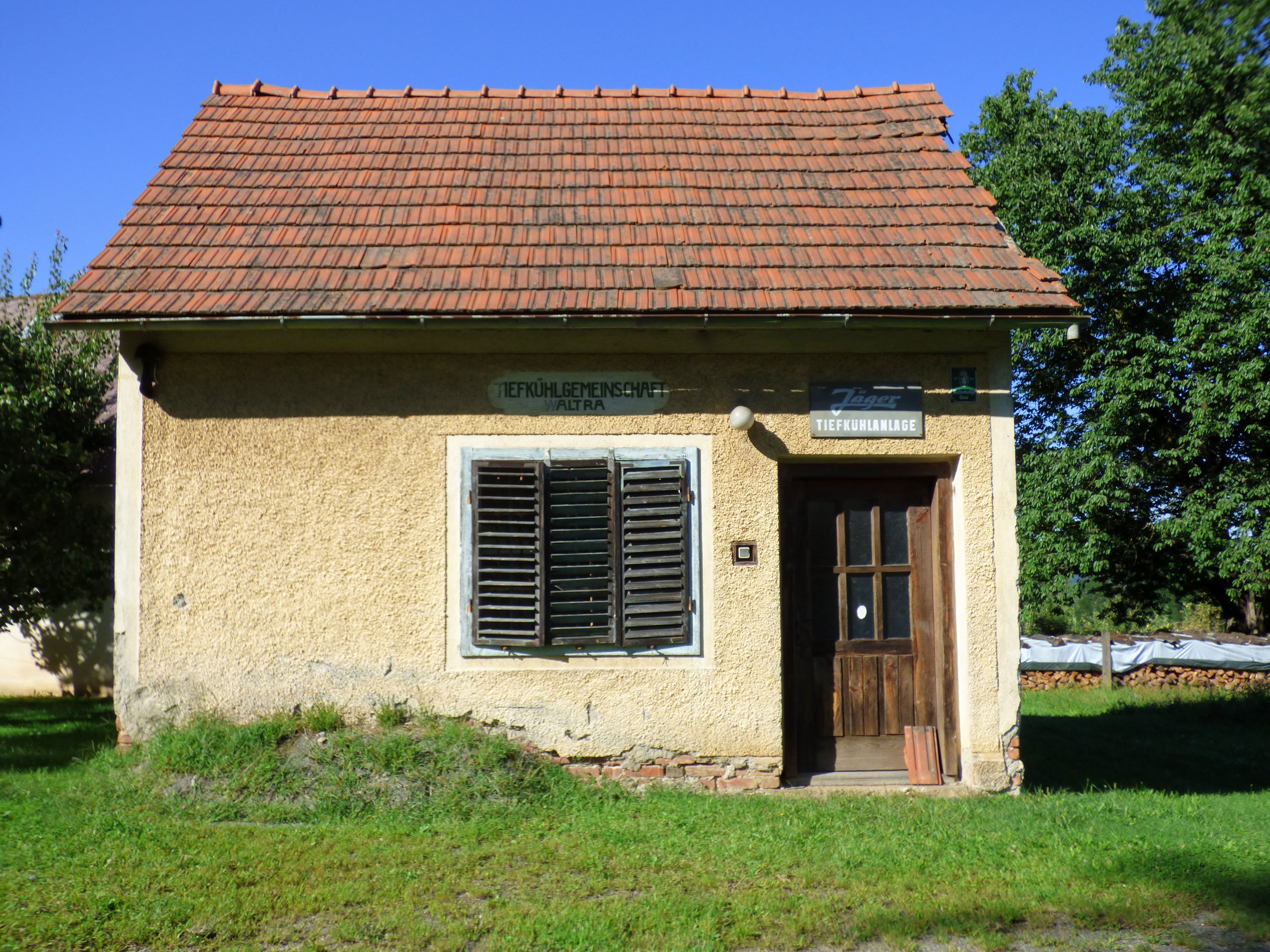 Tiefkühlanlage der Tiefkühlgemeinschaft Waltra Gemeinde Sankt Anna am Aigen